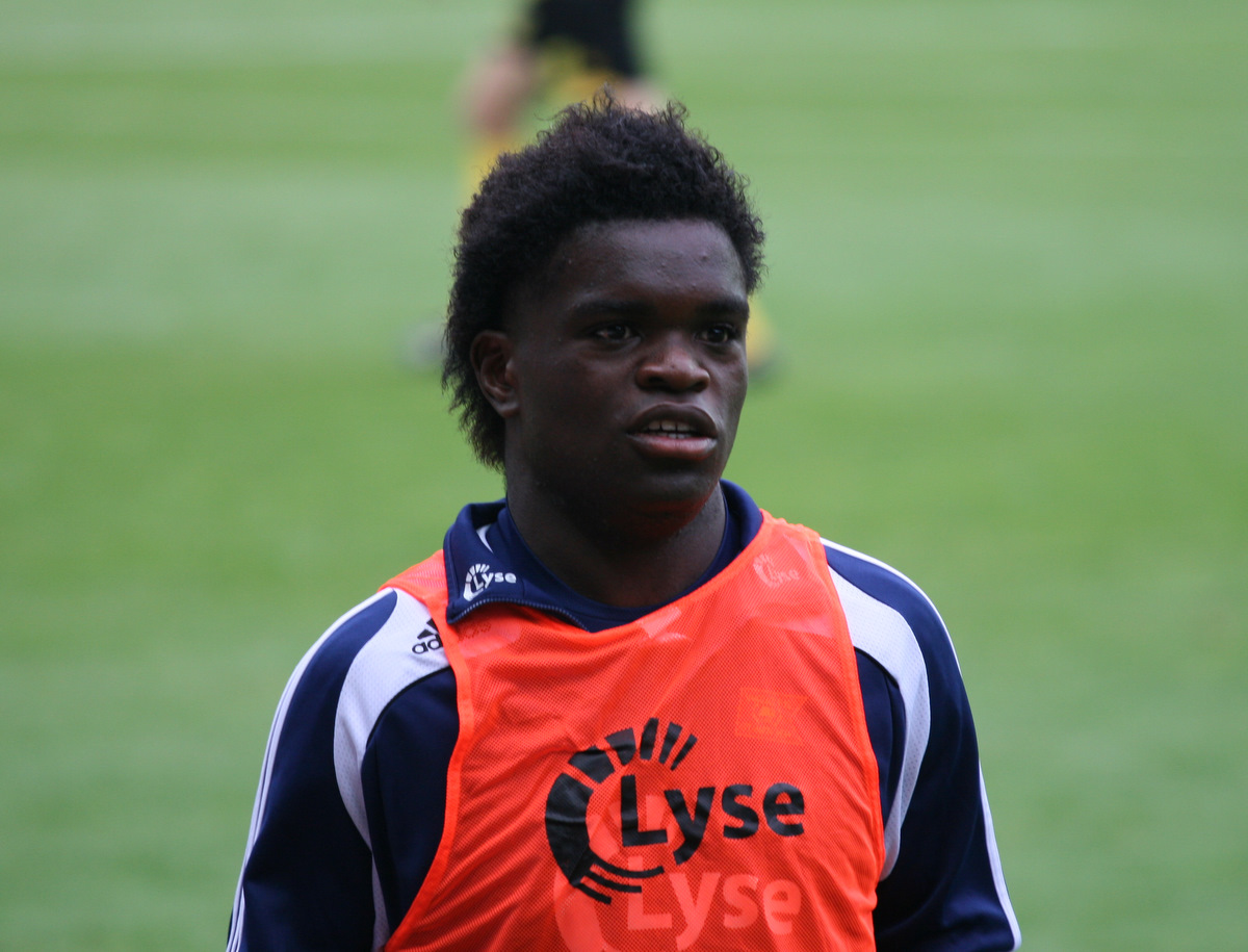 Christian Landu Landu